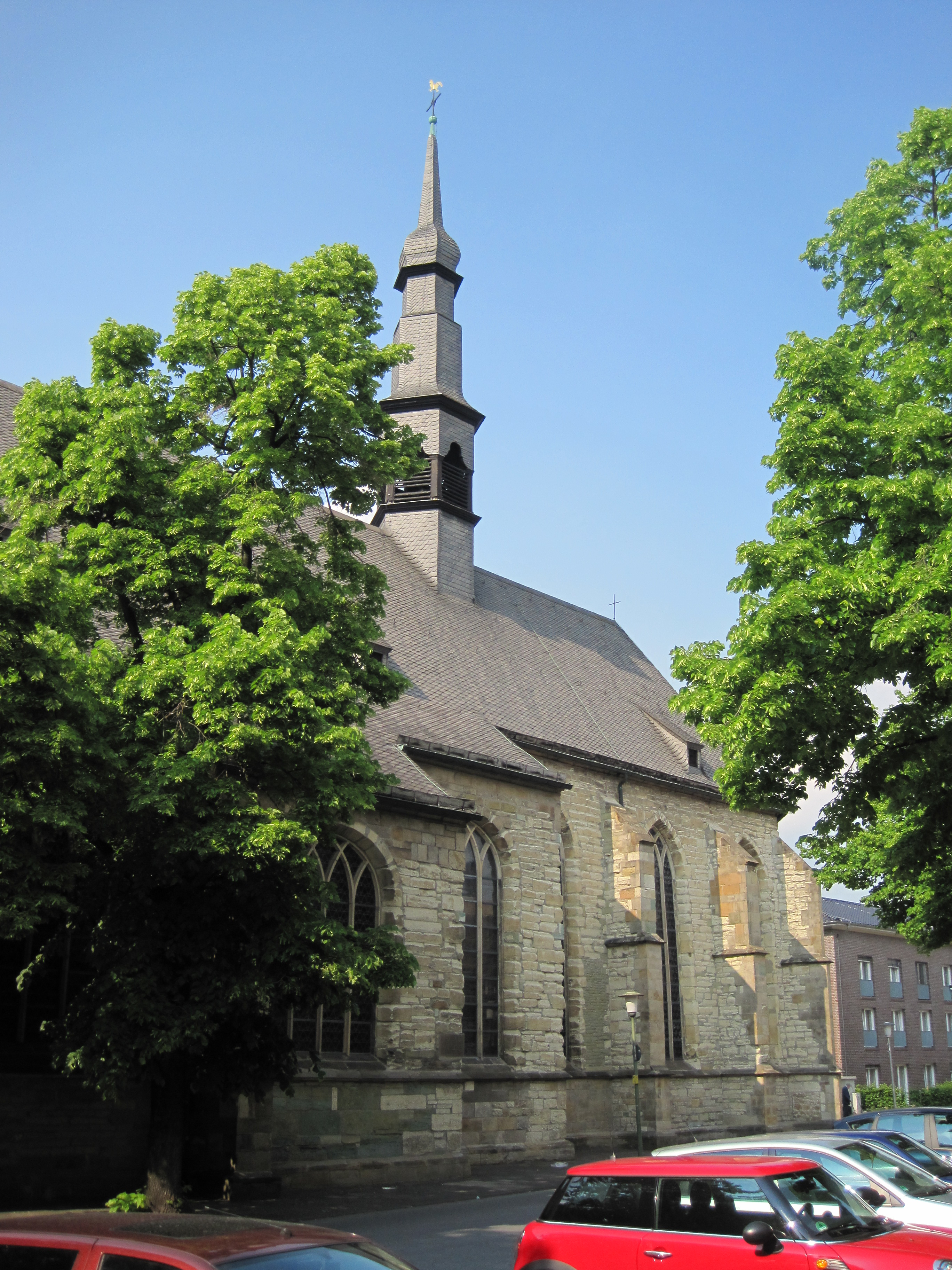 Dieses Foto zeigt die St. Agnes-Kirche in Hamm.